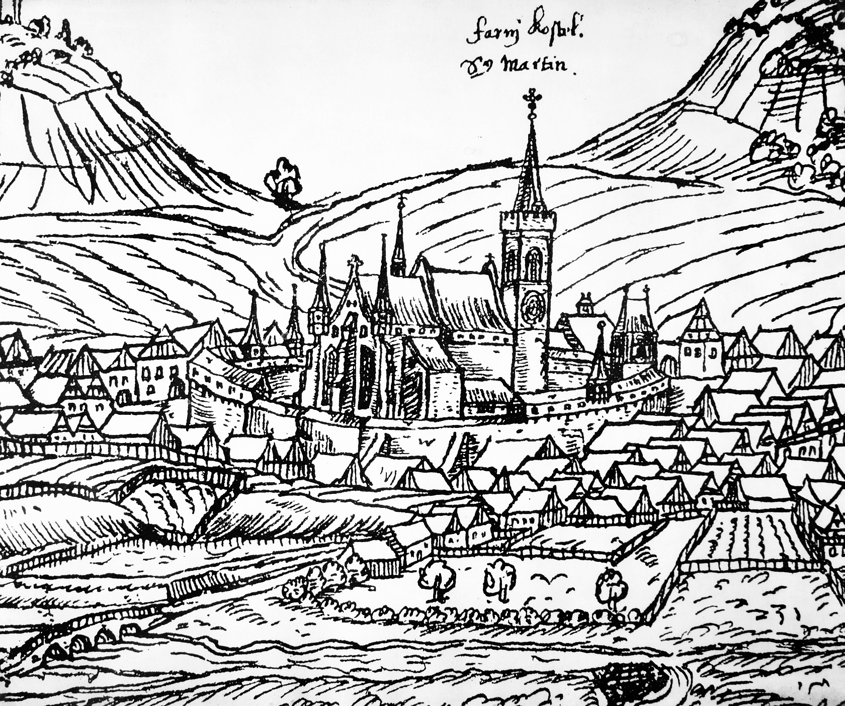 Česky: Sedlčany (okres Příbram), kostel sv. Martina na kresbě Jana Willenberga z roku 1602.